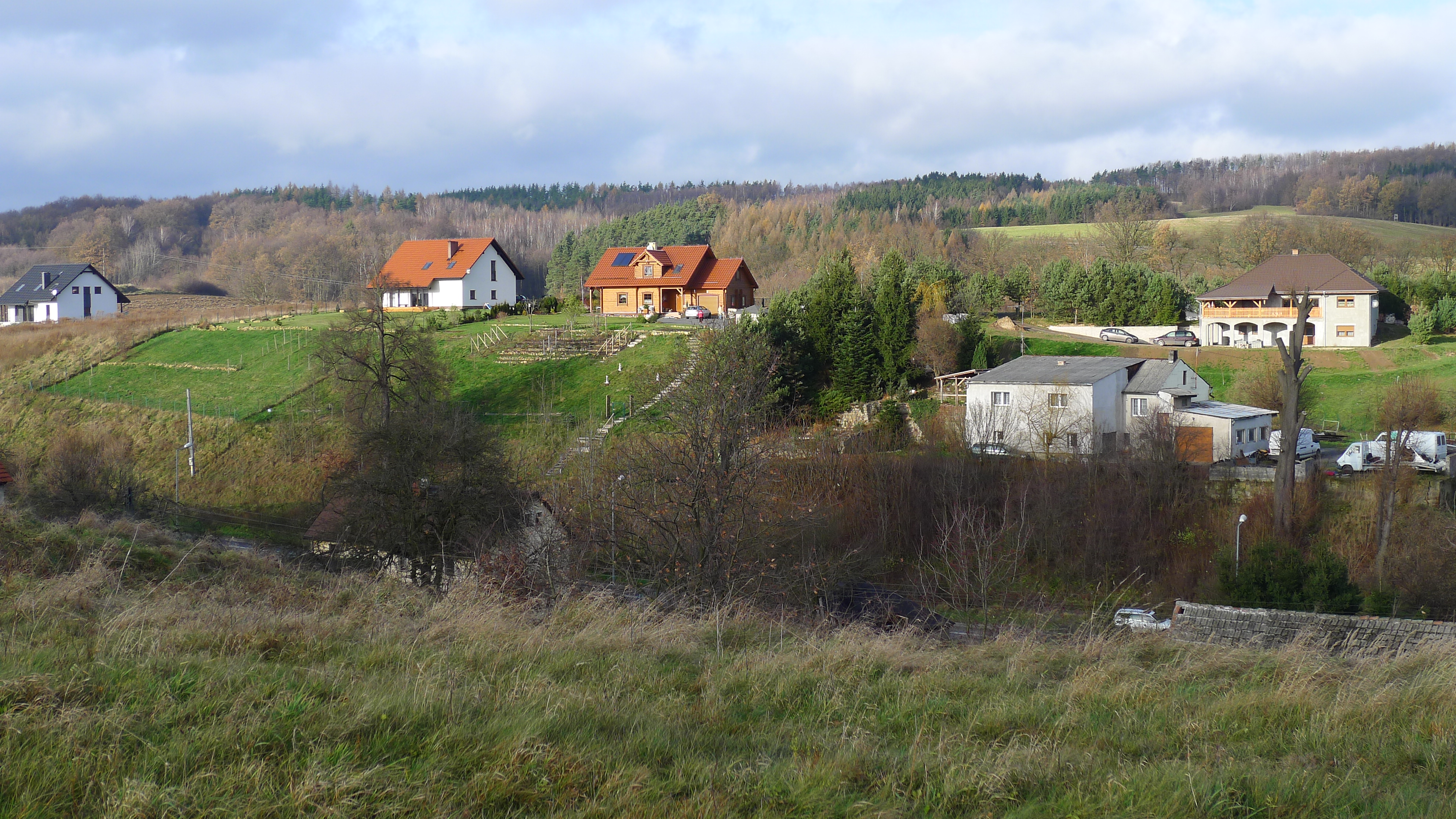 Jerzmanice-Zdrój, środkowa część wsi